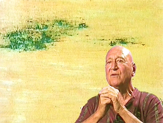 Portrait de René Laubies